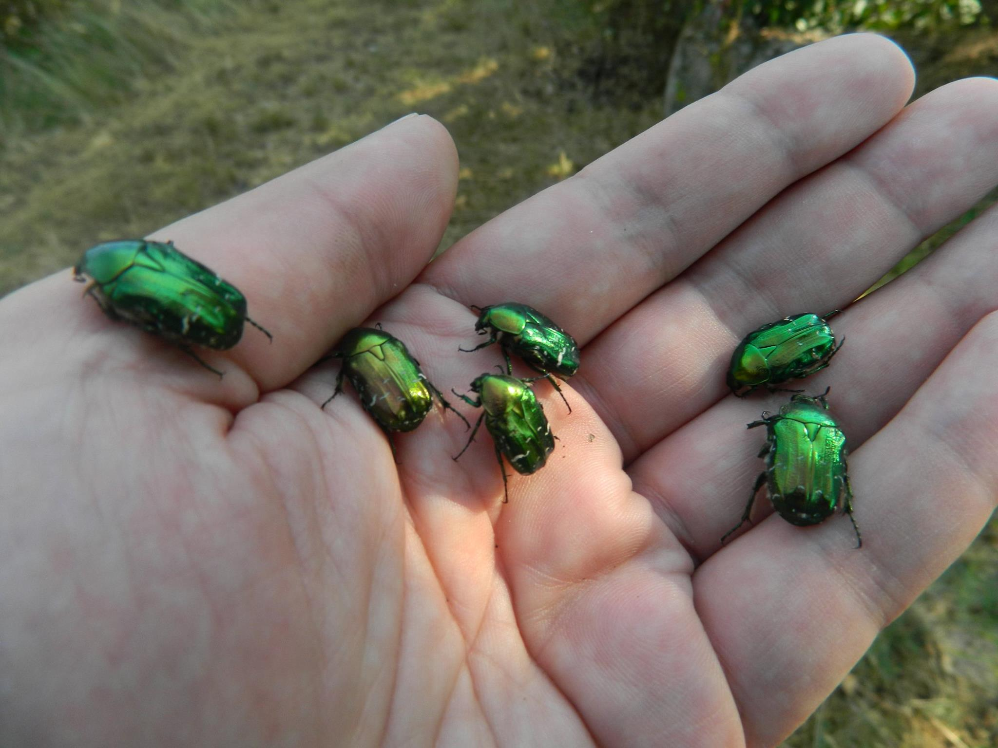 Lozin zlatar (Anomala vitis) autor: Slobodan Zrnić